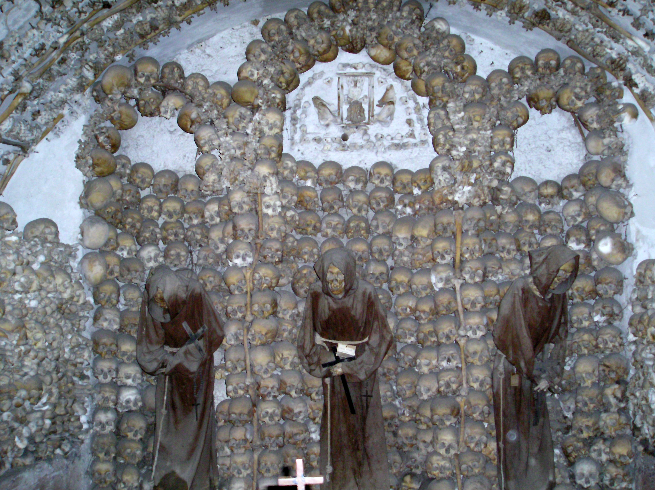 Cripta di Santa Maria della Concezione dei Cappuccini